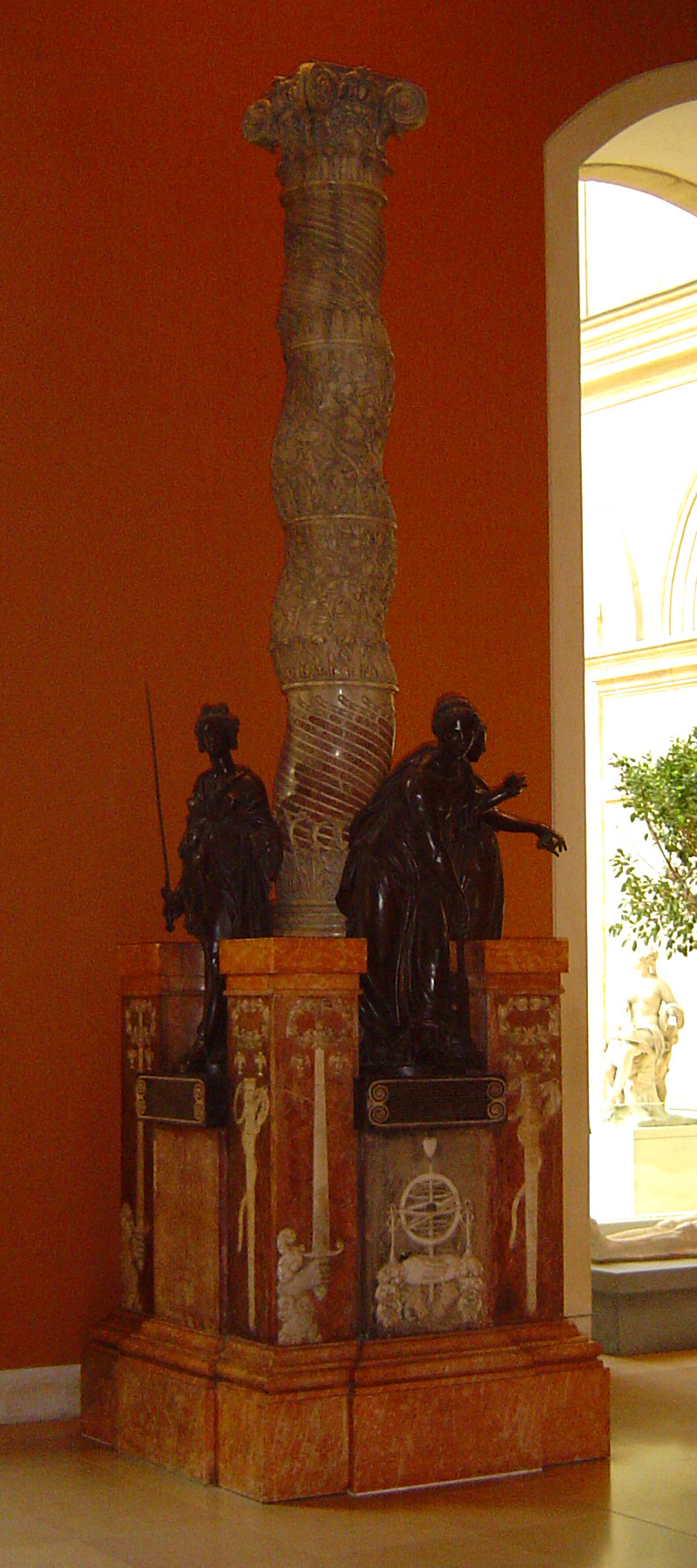 Monument du cœur du connétable Anne de Montmorency